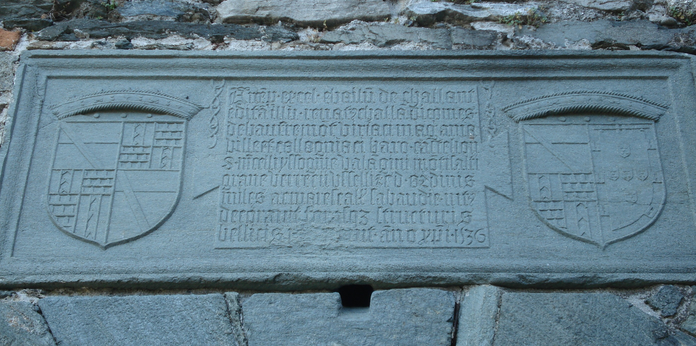 Iscrizione sull'ingresso del castello di Verres in Valle d'Aosta